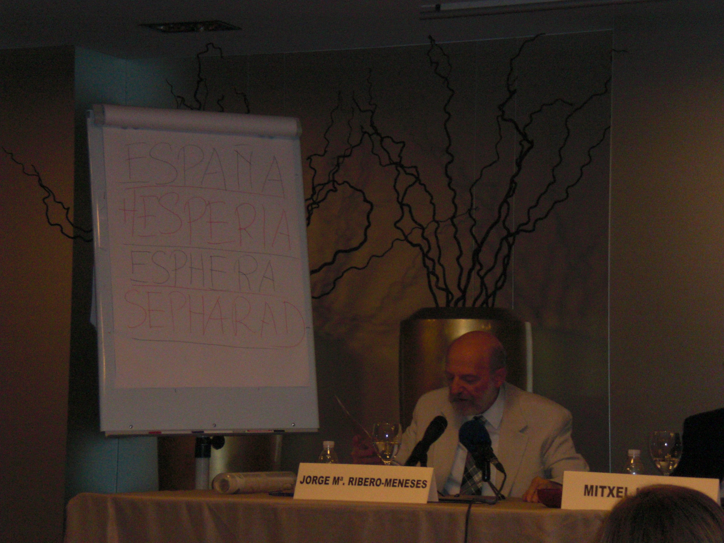 Ribero-Menesesen hitzaldia Bilbon